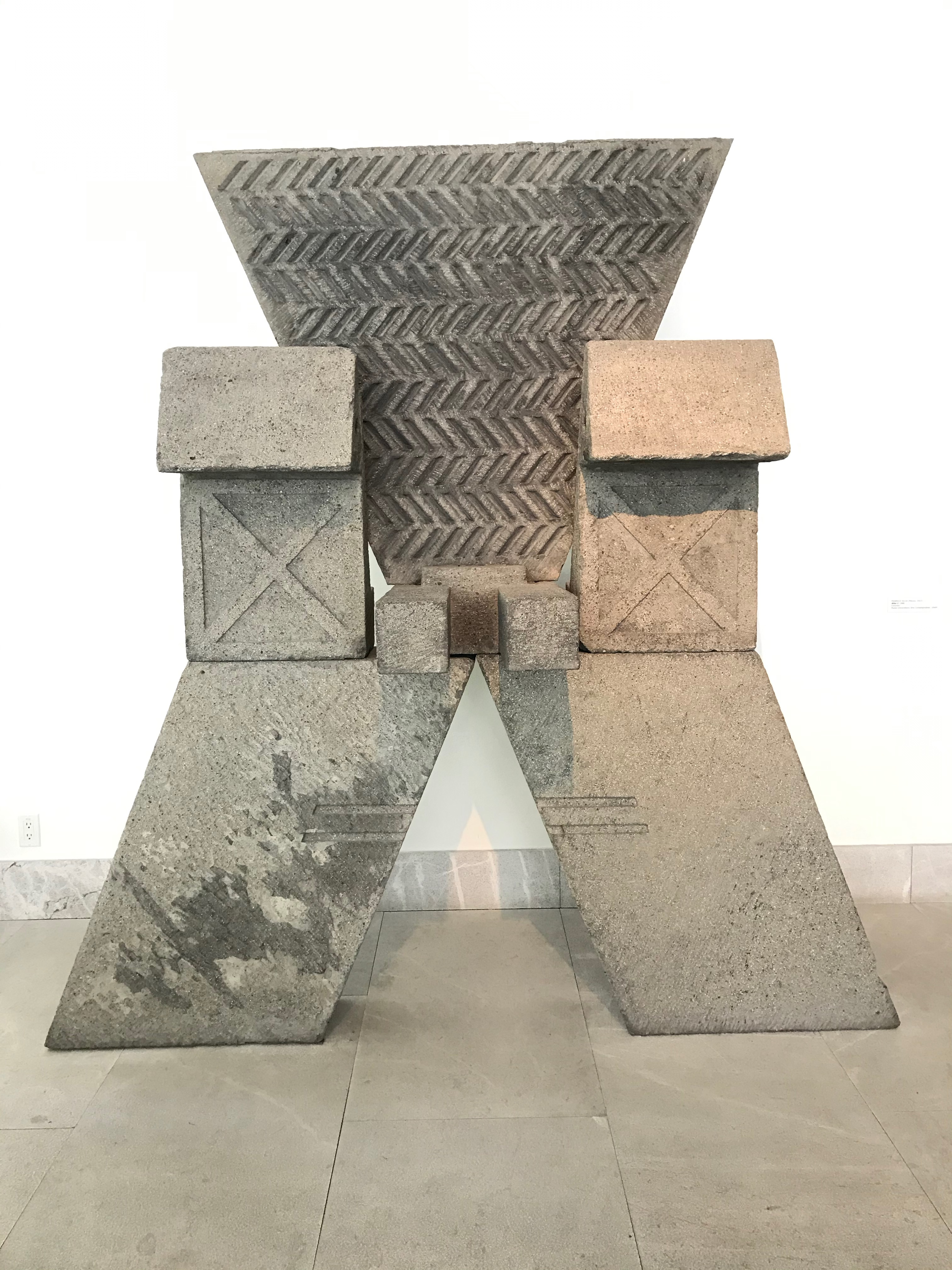 Altar I (1988), escultura de Federico Silva. Concreto, Colección del Museo Universitario de Arte Contemporáneo